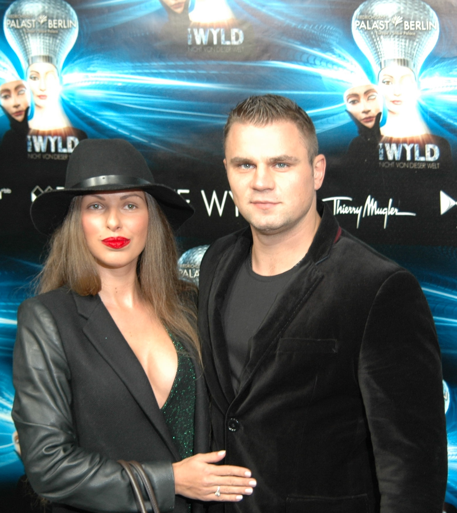 Denis Nikolajewitsch Boizow (rechts)